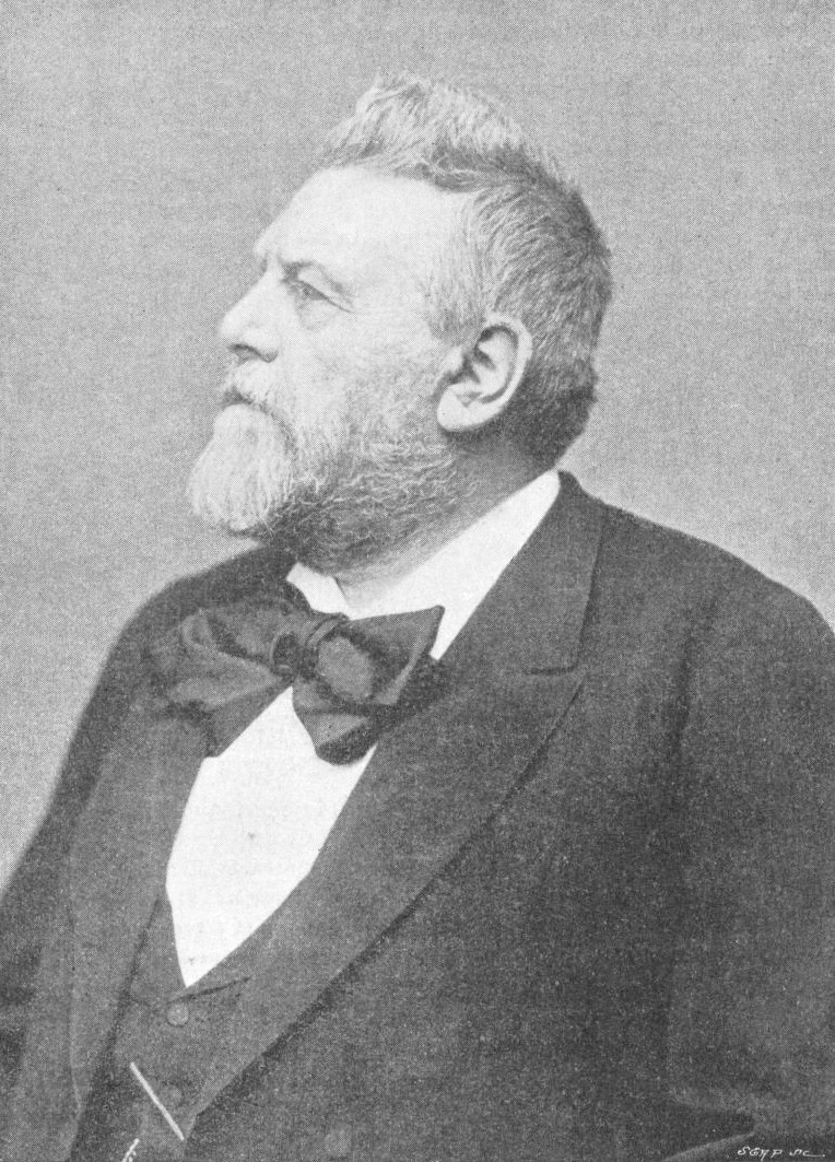 "M. Spuller, mort à Sombernon, le 25 juillet. (Photographie Pierre Petit)".